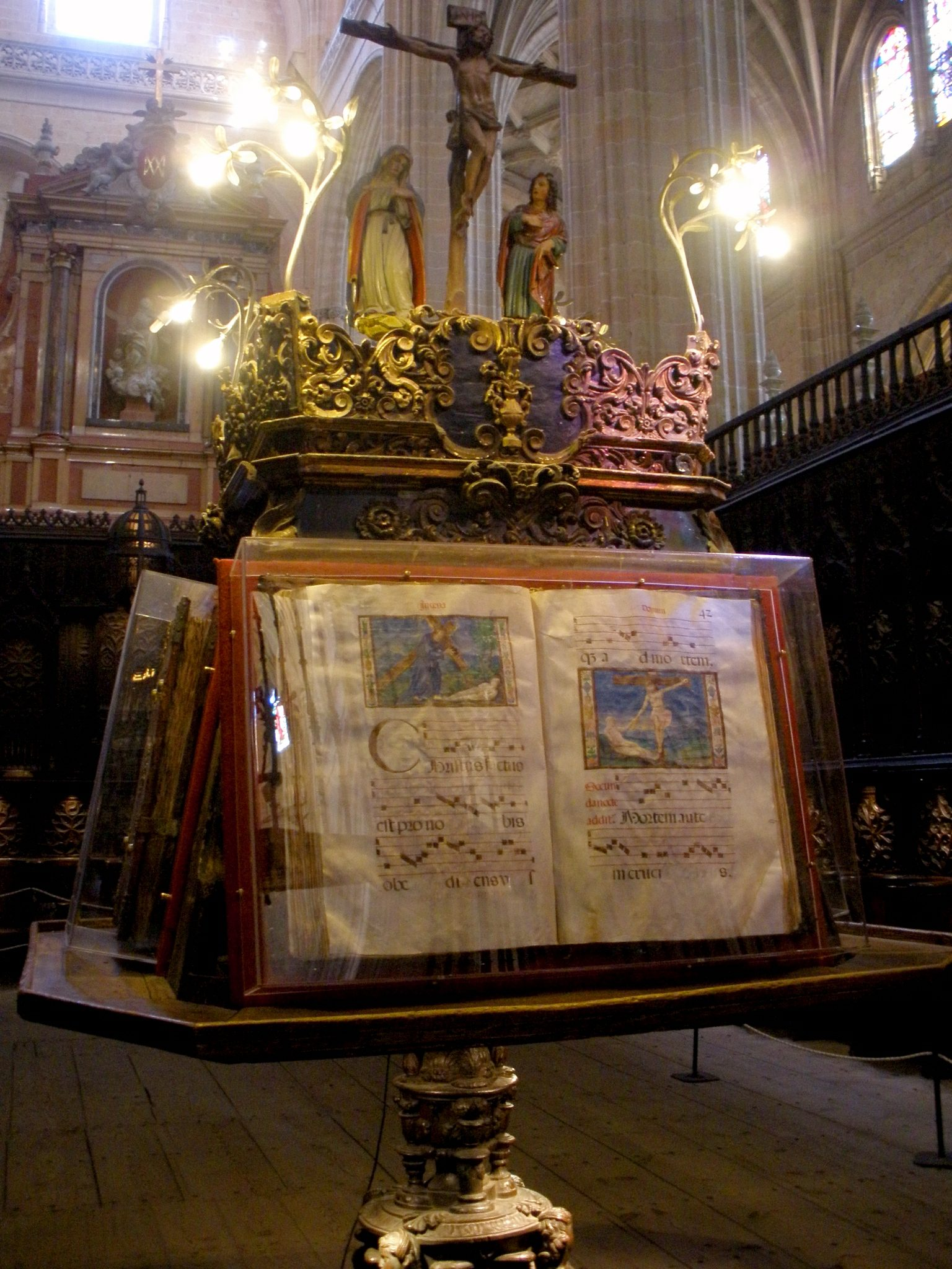 Facistol del coro de la Catedral de Segovia (España). Segovia Cathedral Native nameCatedral de Santa María de SegoviaLocationSegovia , (Spain)Coordinates40° 57′ 00.65″ N, 4° 07′ 32.24″ W EstablishedMiddle AgeWeb page control : Q1499912 VIAF: 151939123 ISNI: 0000 0001 0672 8869 LCCN: n81124924 NLA: 36562756 BIC: RI-51-0000862 WorldCat institution QS:P195,Q1499912